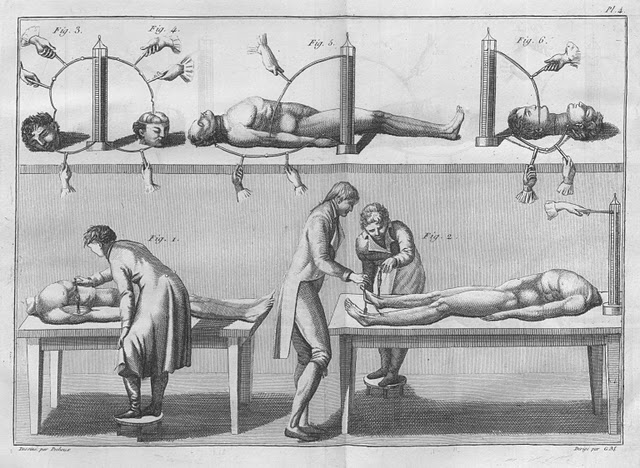 Esperimento sul galvanismo di Giovanni Aldini